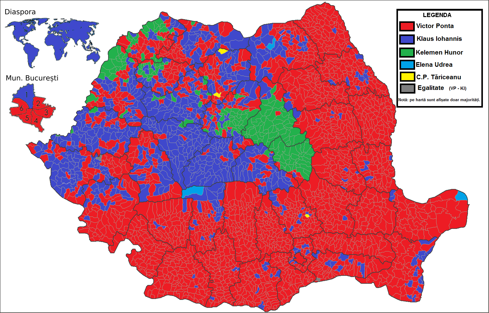 Harta alegerilor prezidențiale din România 2014, primul tur pe comune.